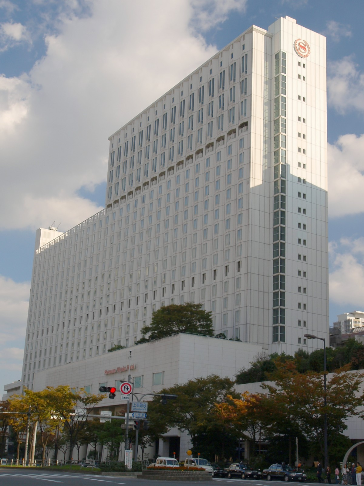 シェラトン都ホテル大阪 所在地：大阪府大阪市天王寺区上本町6-1-55